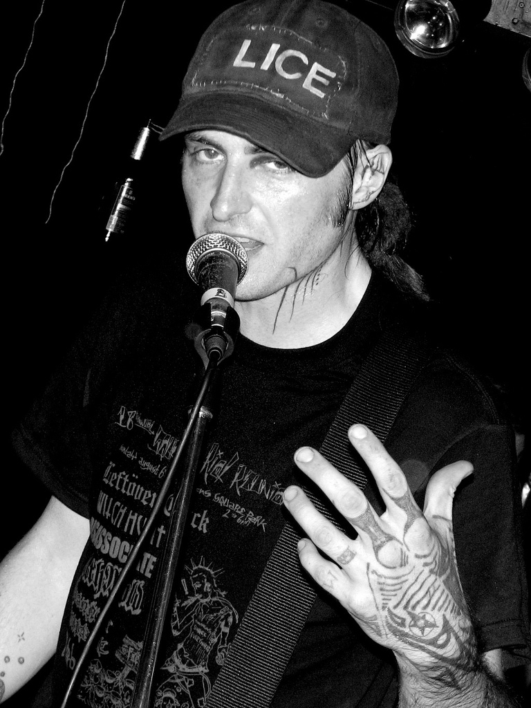 Stza saying something meaningful.